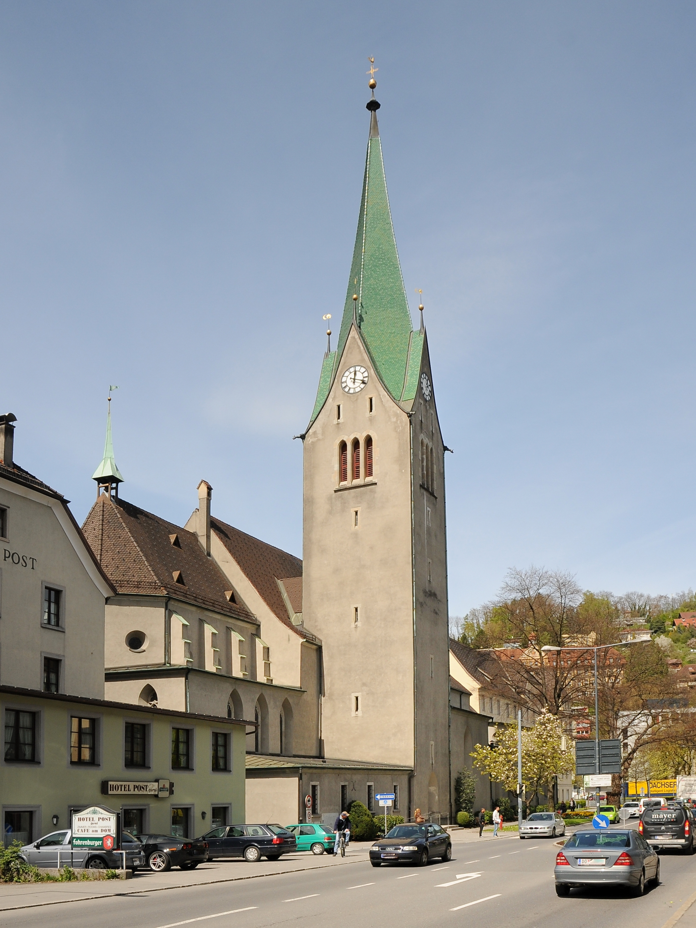 Dom St. Nikolaus (Feldkirch) am Domplatz Nr.2 in Feldkirch.